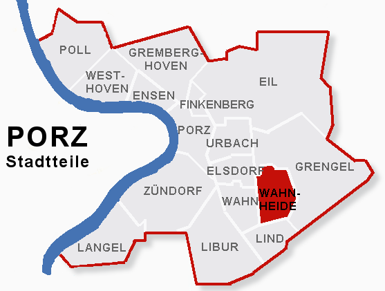 Lage des Stadtteils Wahnheide im Stadtbezik Porz